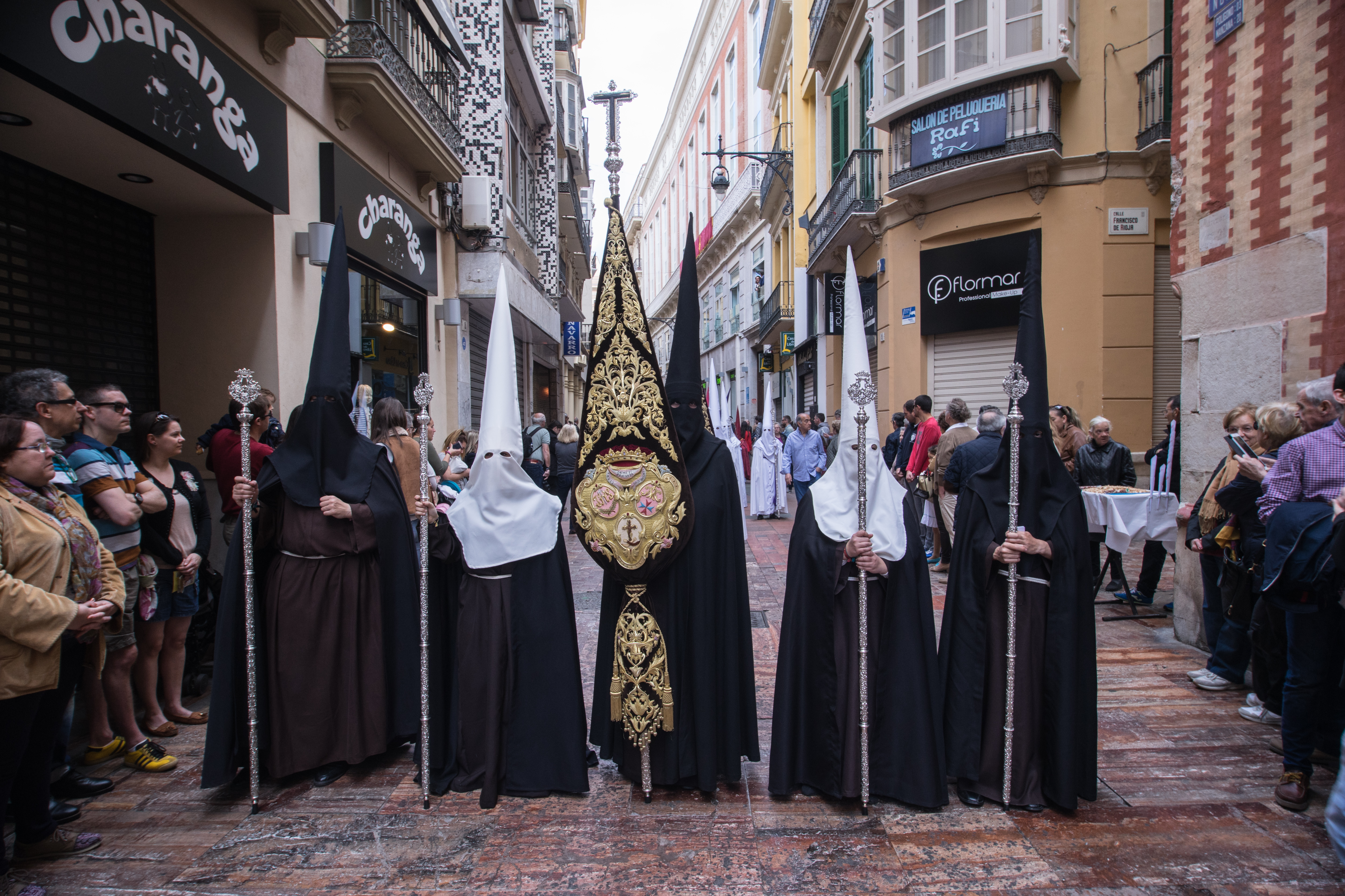 Procesión de la Agrupación de Cofradías de Málaga This is a photography of a Folklore festival in Spain (Wikidata id Q9075883).